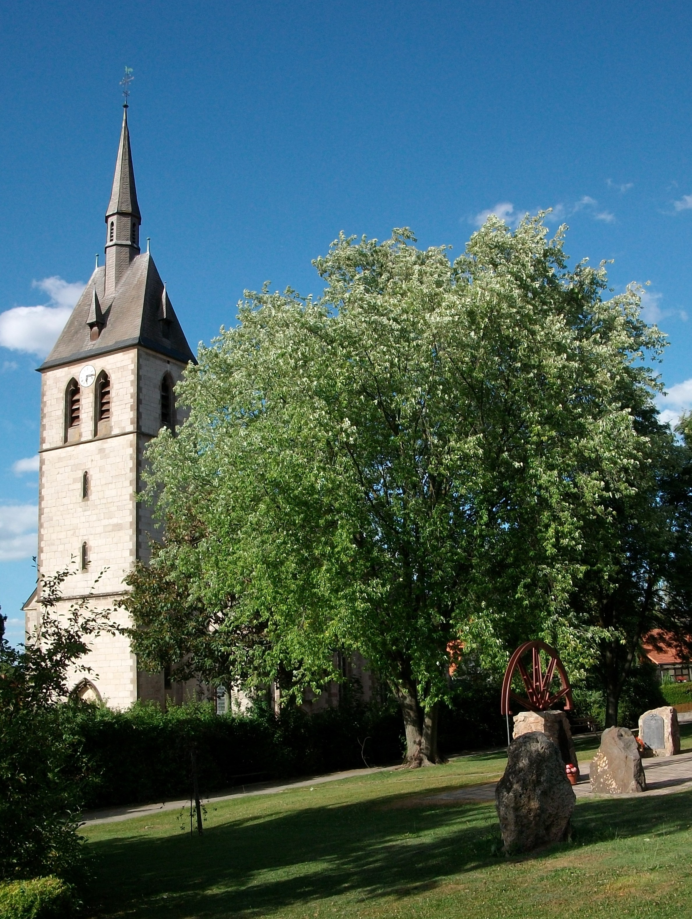 Denkmalgeschützte kath. Kirche St. Fabian und Sebastian in Marsberg-Giershagen (Germany)